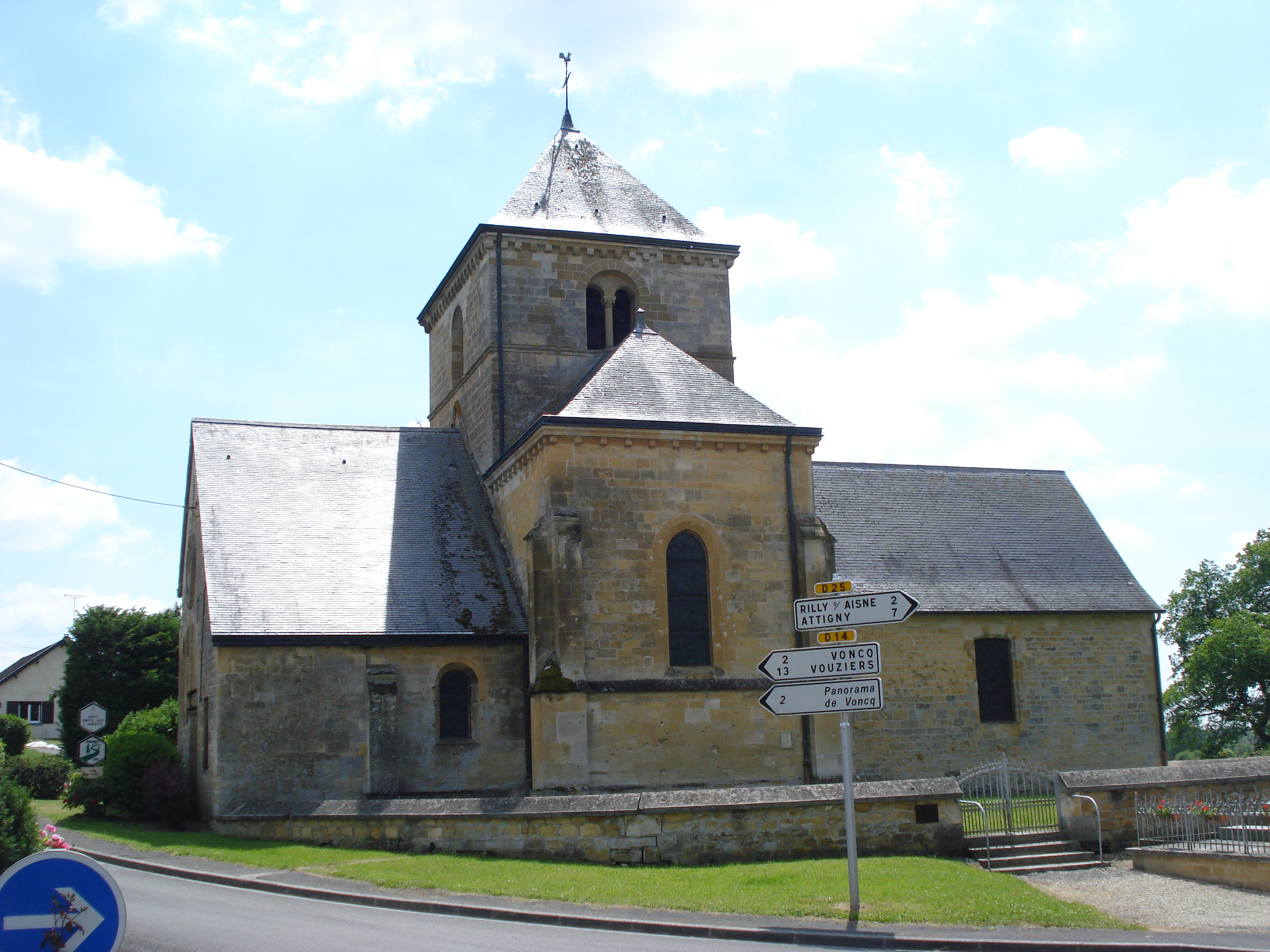 Semuy (Ardennes, Fr), Église Saint-Nicolas de Semuy